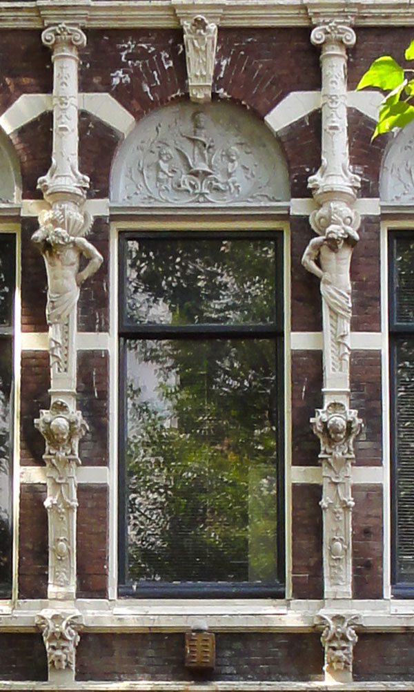 Turfmarkt 12 (detail) Gouda, rijksmonument